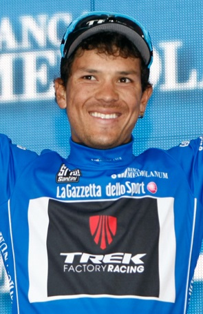 Julian Arredondo en la etapa 17° del Giro 2014.